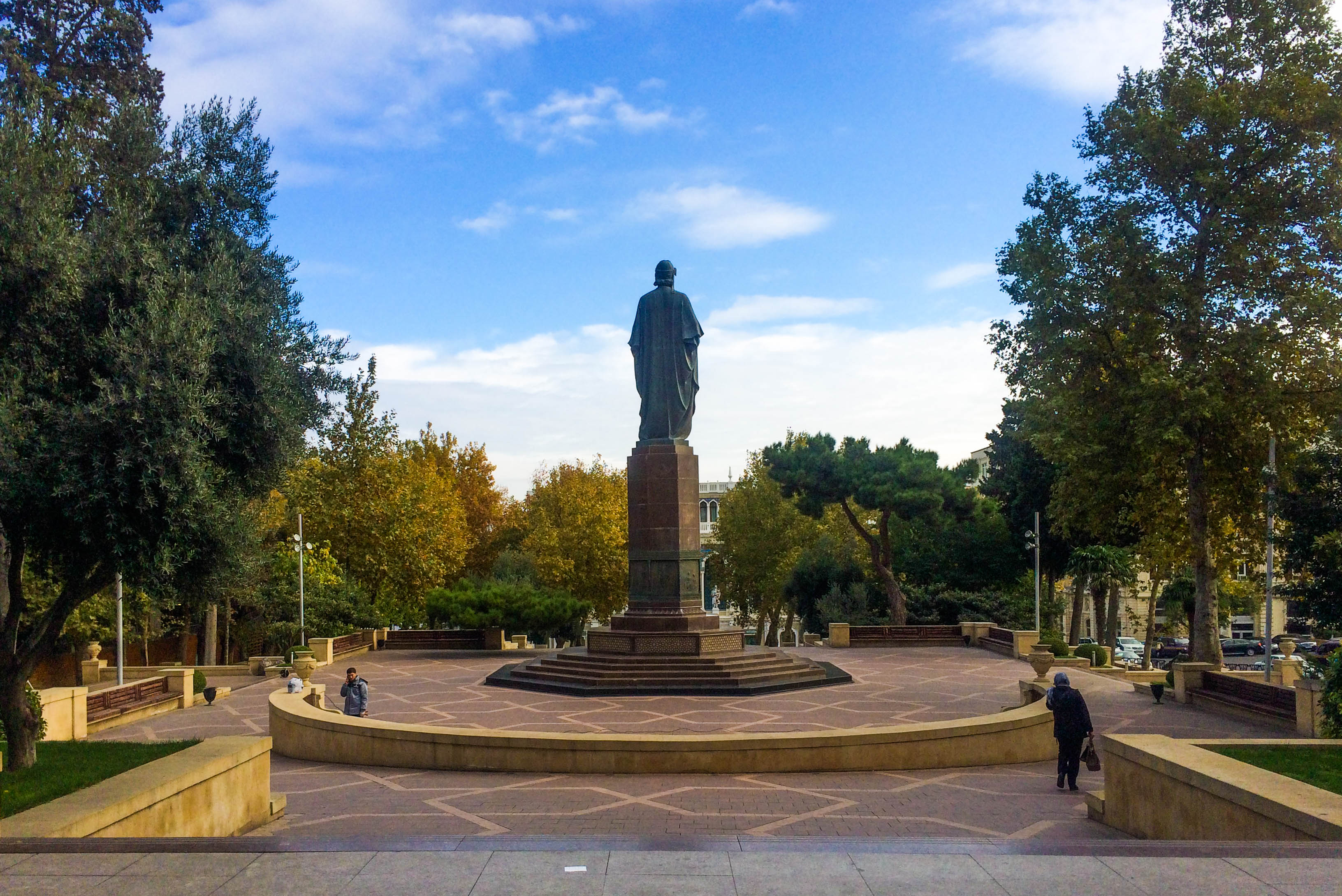 Nizami Garden in Baku